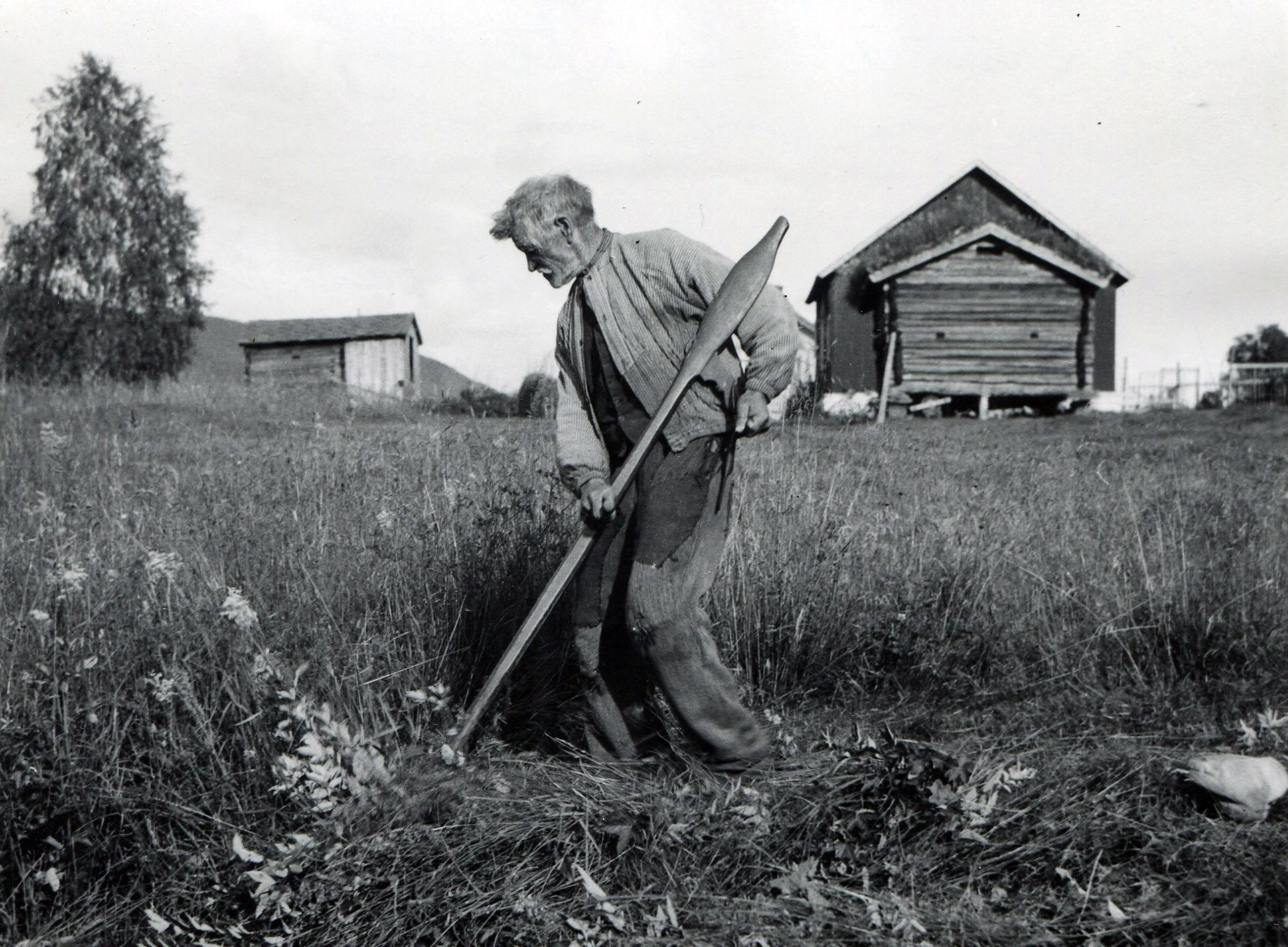 "Eg er so gamal at eg held meg til ljå. Stilt syng han i graset, og tankane kan gå.” (frå Ljåen av Olav H. Hauge) Sommarbilete frå Sør-Fron i Gudbrandsdalen med tittel Gammel slåttekar. Årstall ukjent. Brukar du ljå når du skal slå graset? Henta frå arkivet etter Landslaget for reiselivet (Pa722_Uaa_3_005) Publisert som en del av prosjektet #arkivsommer sommeren 2014.